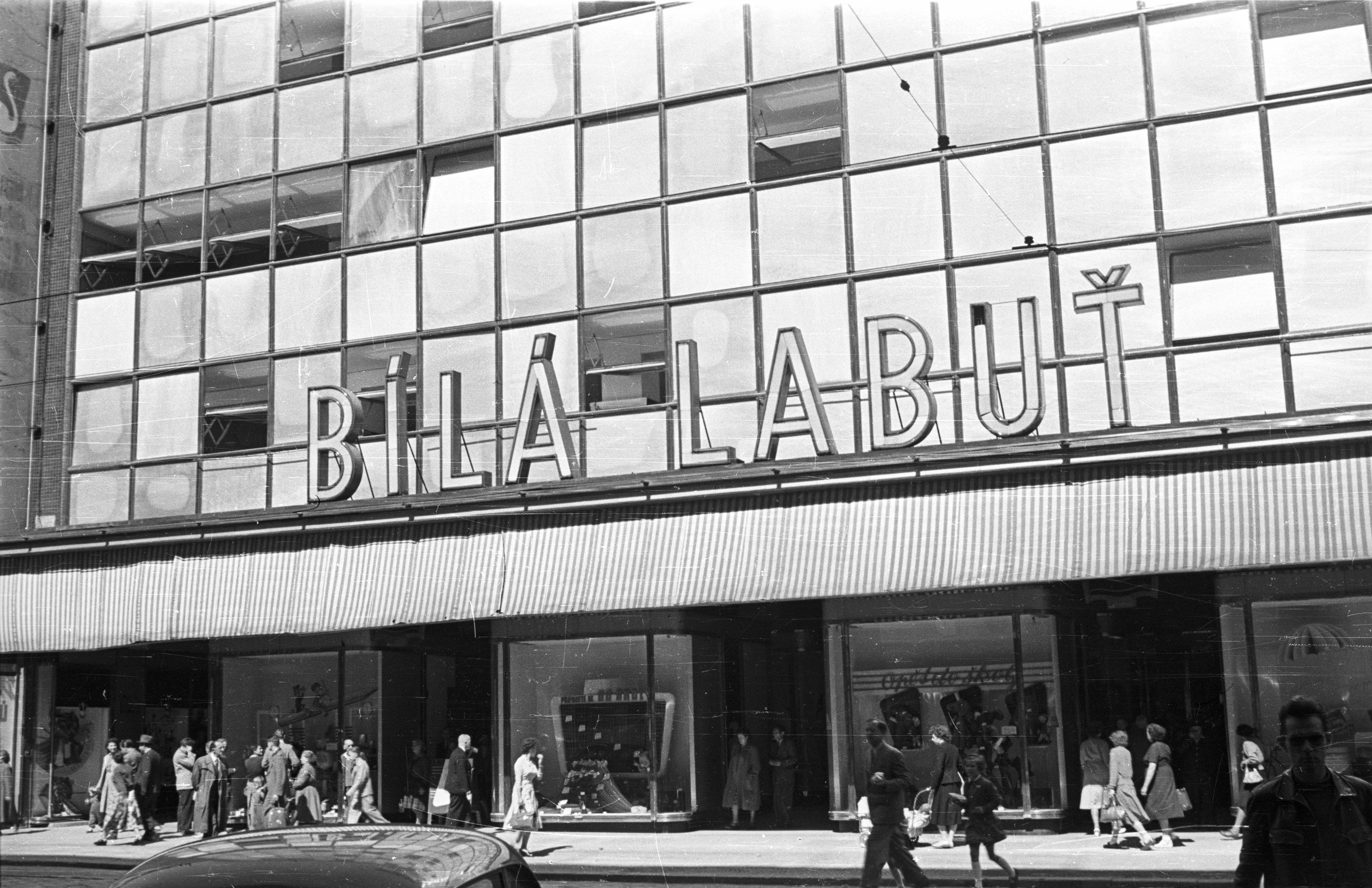 Na Porici ulice 23., Bílá Labut áruház. Location: Czech Republik, Prague Tags: Czechoslovakia, store, label, modern architecture, department store Title: Na Porici ulice 23., Bílá Labut áruház.